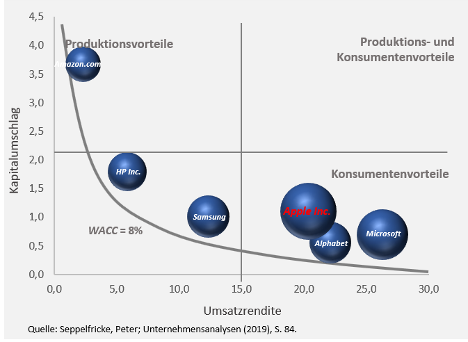 Aufspaltung ROI